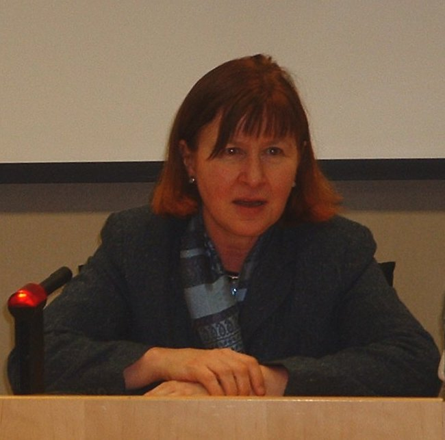 Deutsche MdEP Heide Rühle in Brüssel, 1. Dezember 2004.